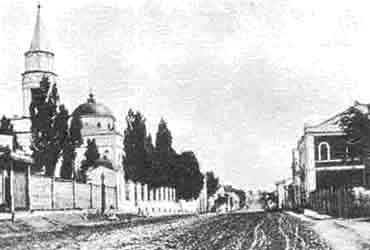 Свято-Дмитриевская церковь в Харькове до реконструкции М.Ловцовым в 1885 г.